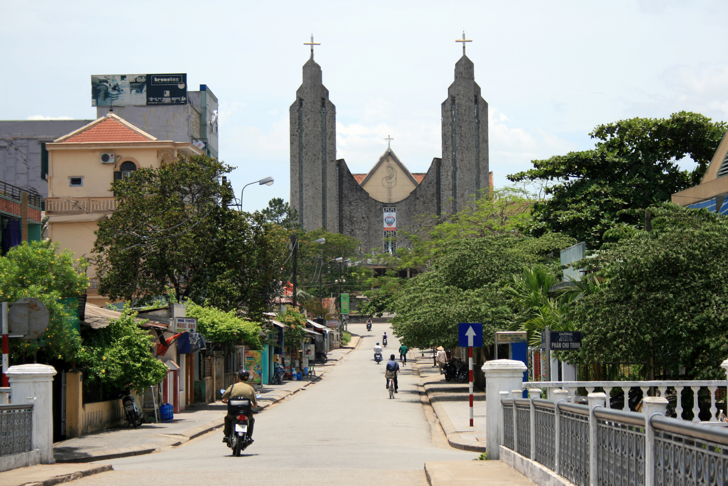 Đường lên Nhà thờ Phủ Cam, Huế - nhìn từ cầu Phủ Cam